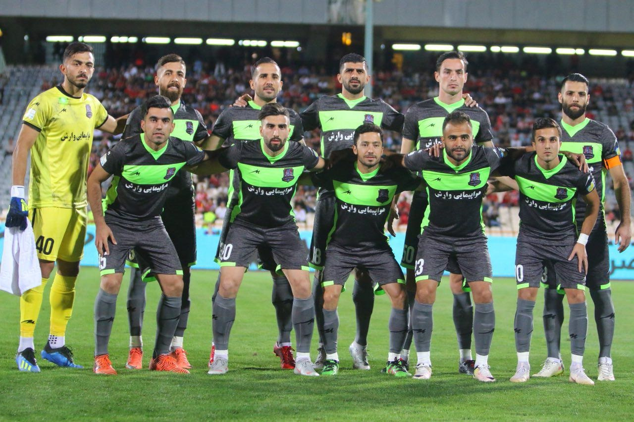 مازِرونی: نساجی و پرسپولیس ِاولین کا، تهران دله